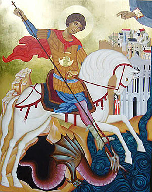 Reggio Calabria - icona di San Giorgio nella chiesa di San Giorgio Extra Moenia (o di San Giorgio martire)